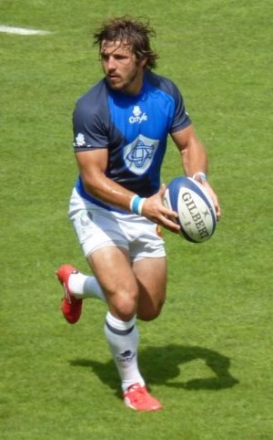 Marc Andreu du club de rugby à XV Castres olympique.